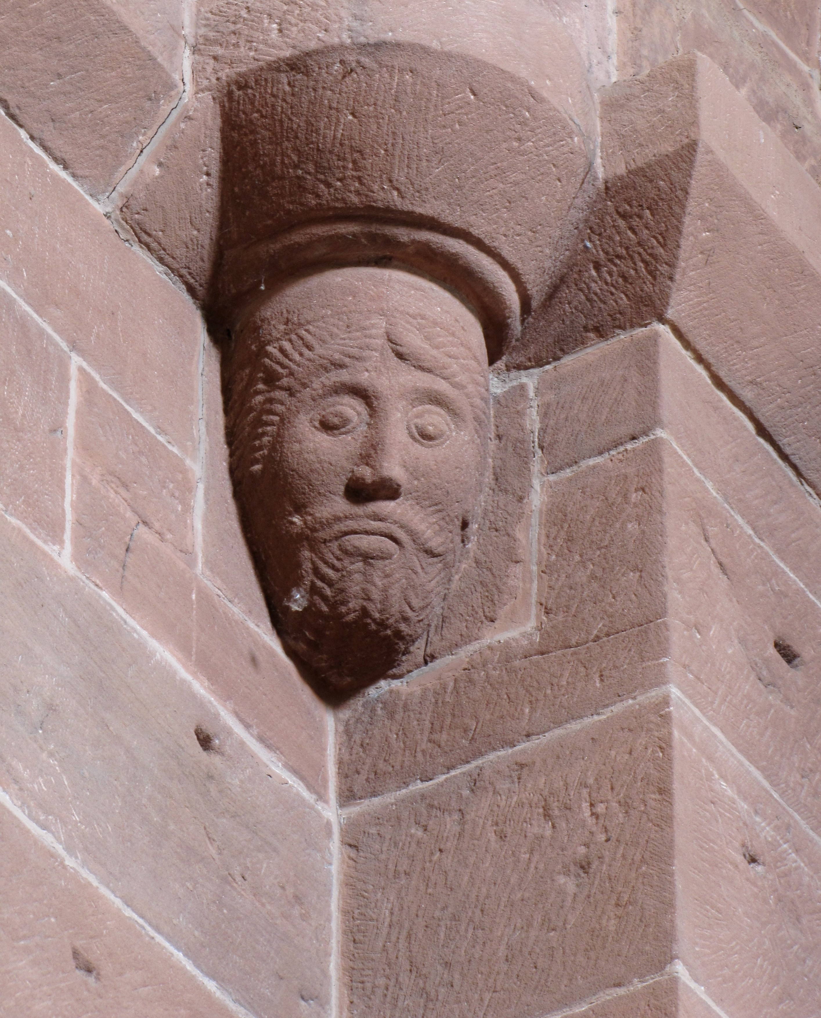 Alsace, Bas-Rhin, Saint-Jean-Saverne, Église abbatiale Saint-Jean-Baptiste (PA00084921, IA00055618): Corbeau roman de la nef.